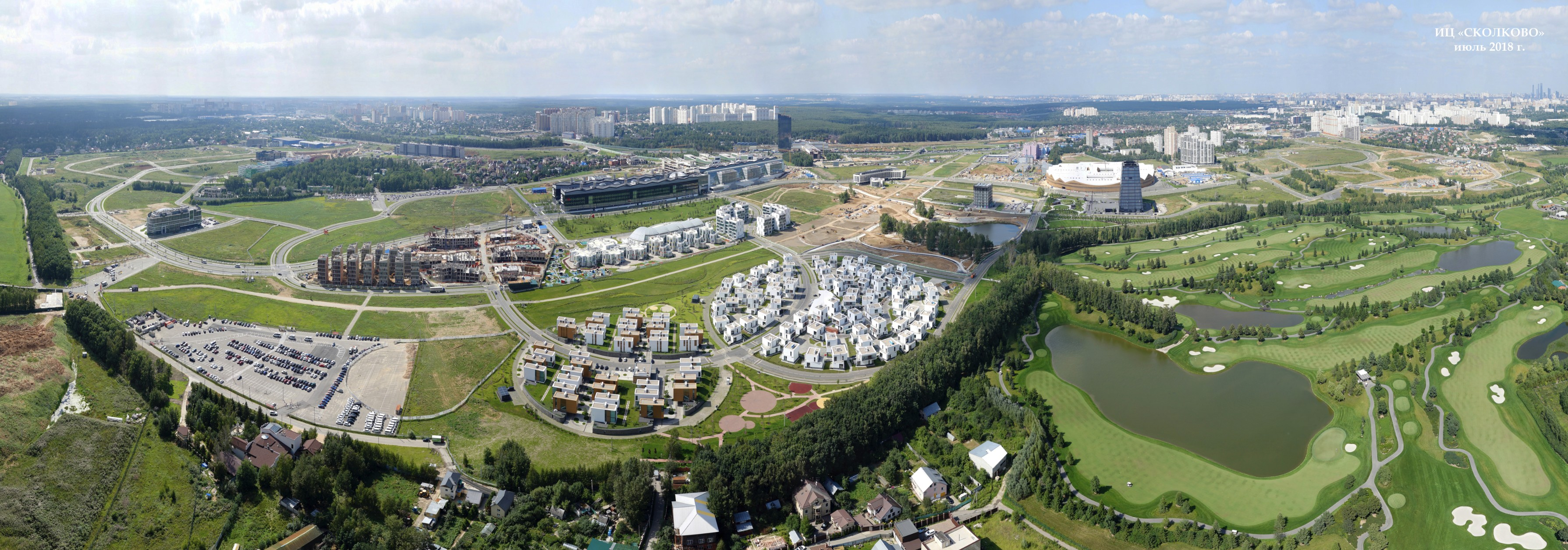 Инновационный центр "Сколково"